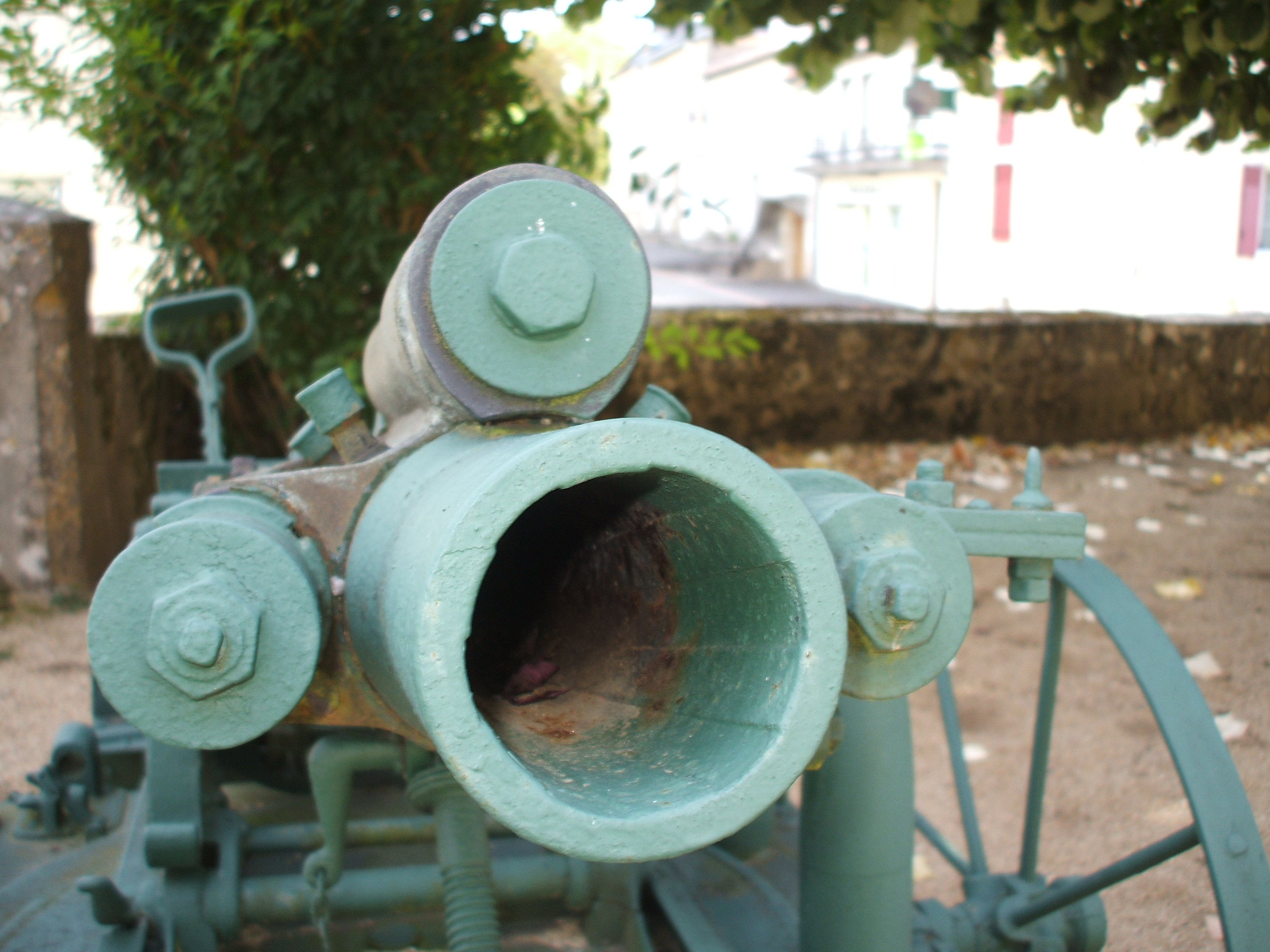 Minenwerfer_léger 76 mm 1916 neue Art, 1916, photographié auprès du monument aux morts de Verrières (département français de la Vienne)